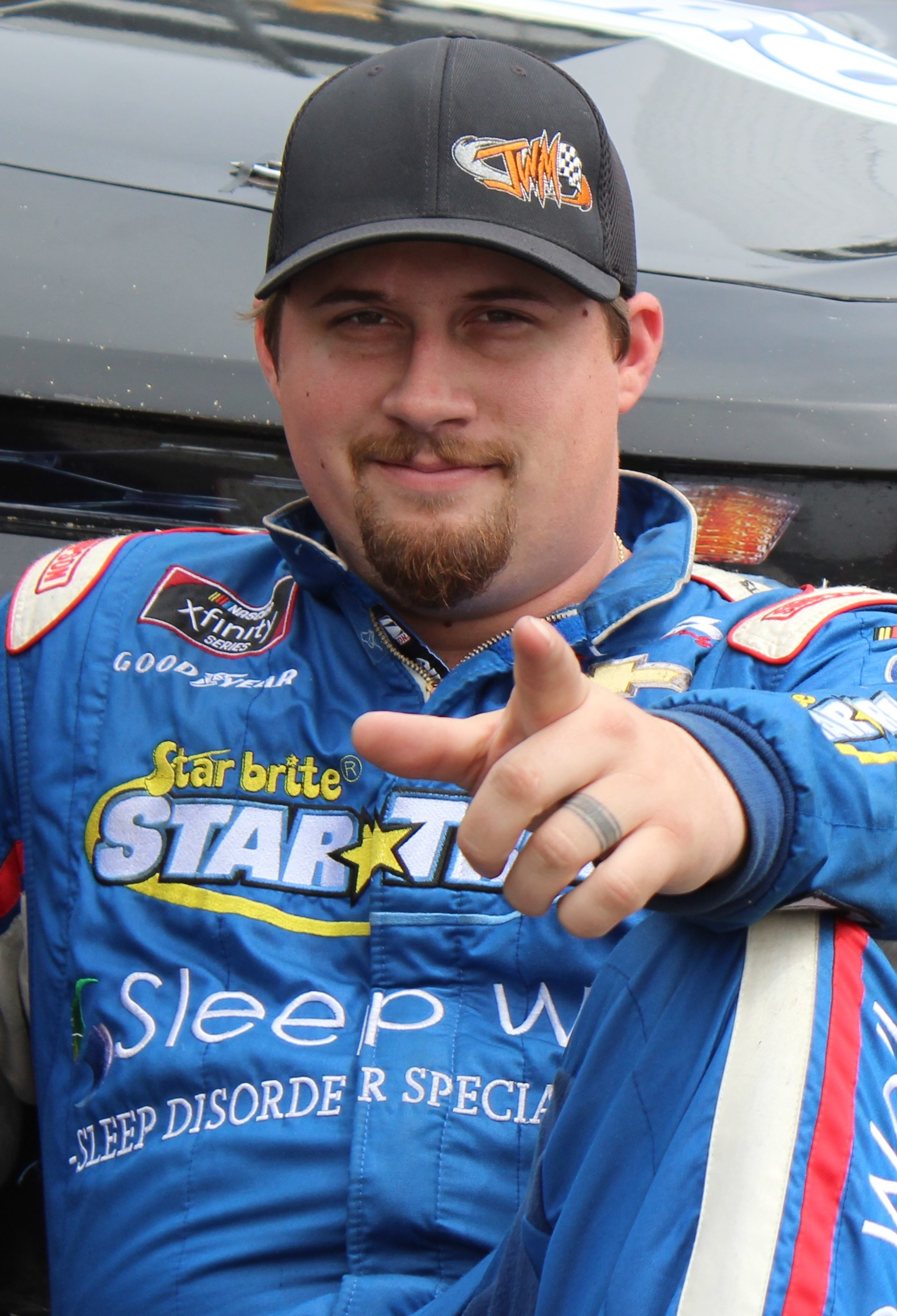 2019 Gander RV 400